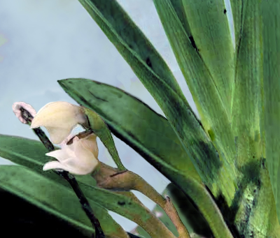 L'Angrec est actuellement la seule fleur connue pollinisée par une sauterelle. Photo perso retouchée sur Toshop